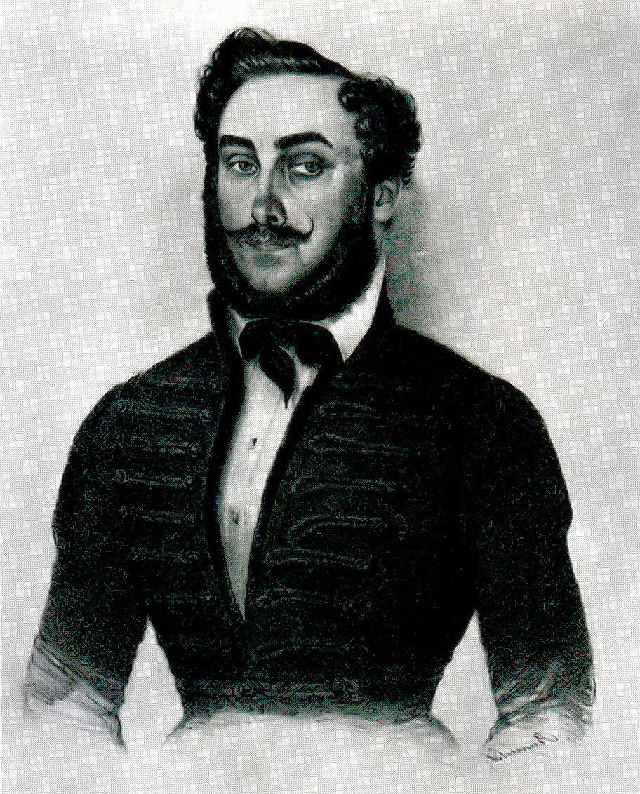 Balogh János (1796–1872) politikus, honvédtiszt, mint Bars vármegye országgyűlési követe (1830-as évek). Ruprecht János litográfiája